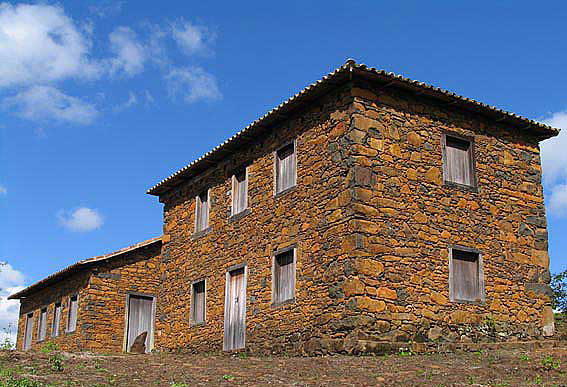 Casa de pedra em Nova Veneza, Santa Catarina, Brasil.